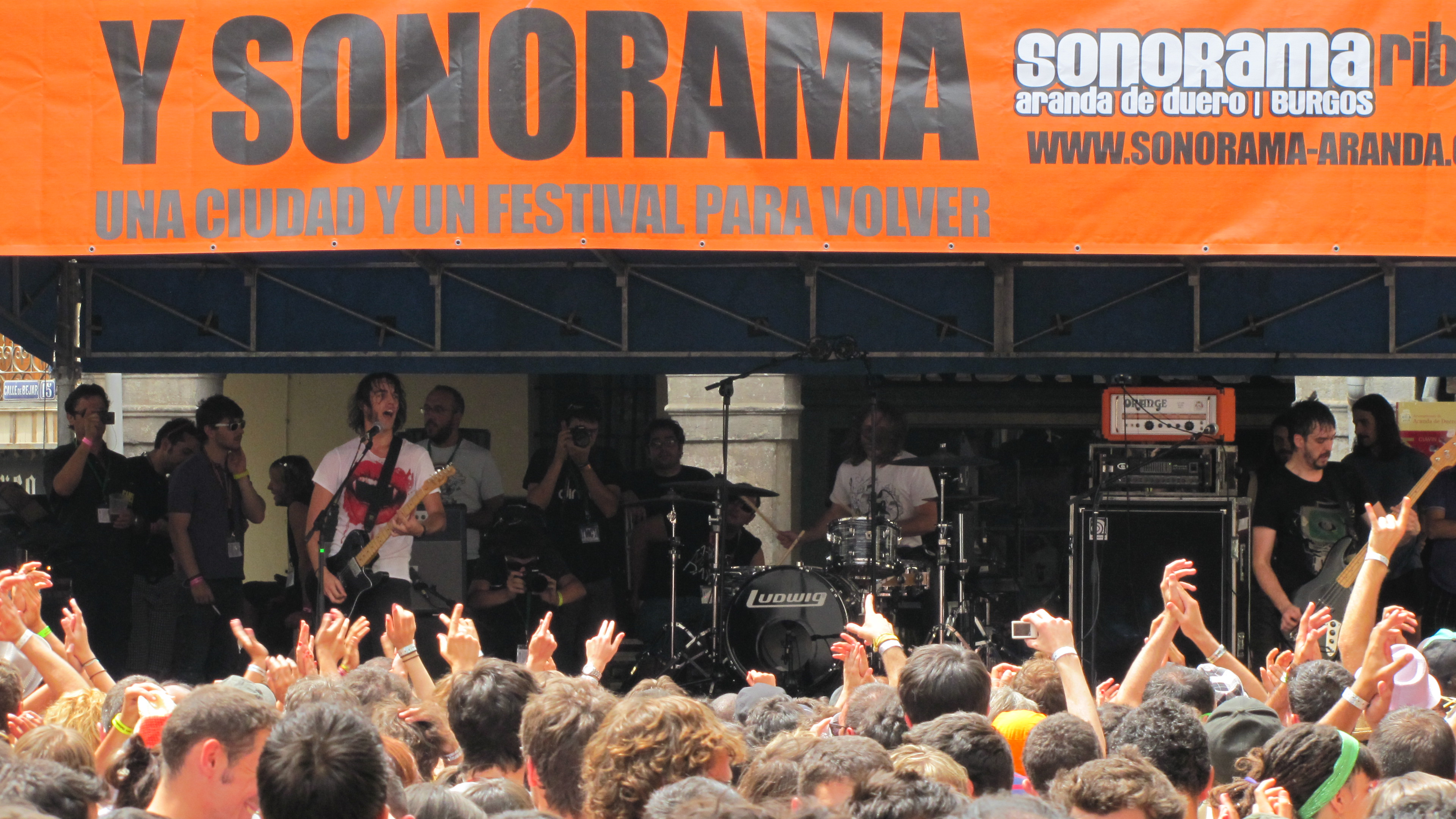 Concierto del Grupo Dinero durante el Festival Sonorama 2011, en la Plaza del Trigo en Aranda de Duero (Burgos-España)